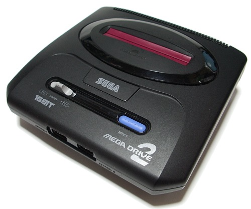 メガドライブ2本体 投稿者撮影。